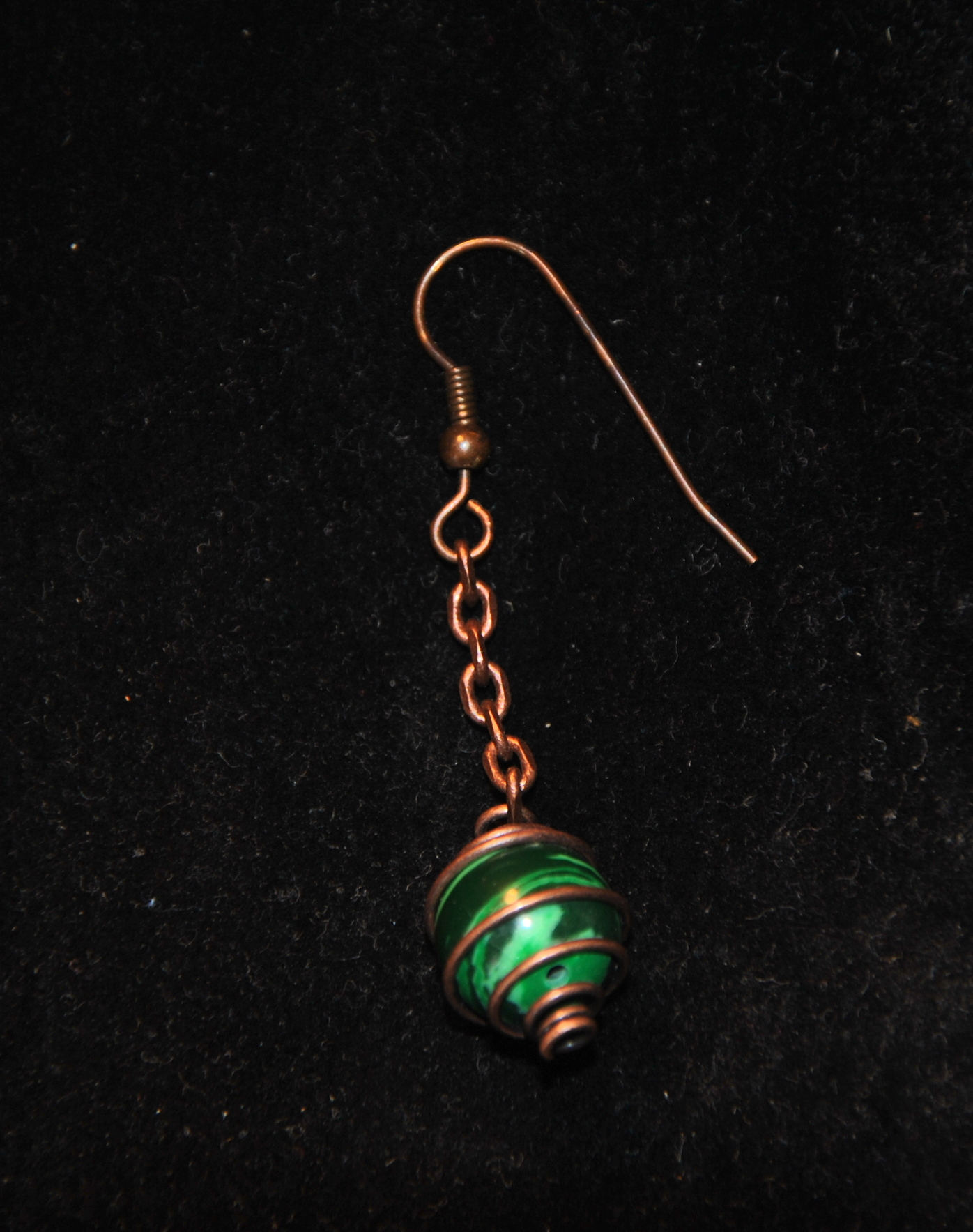 Crochet d'oreille en cuivre muni d'une cage à perle contenant une malachite